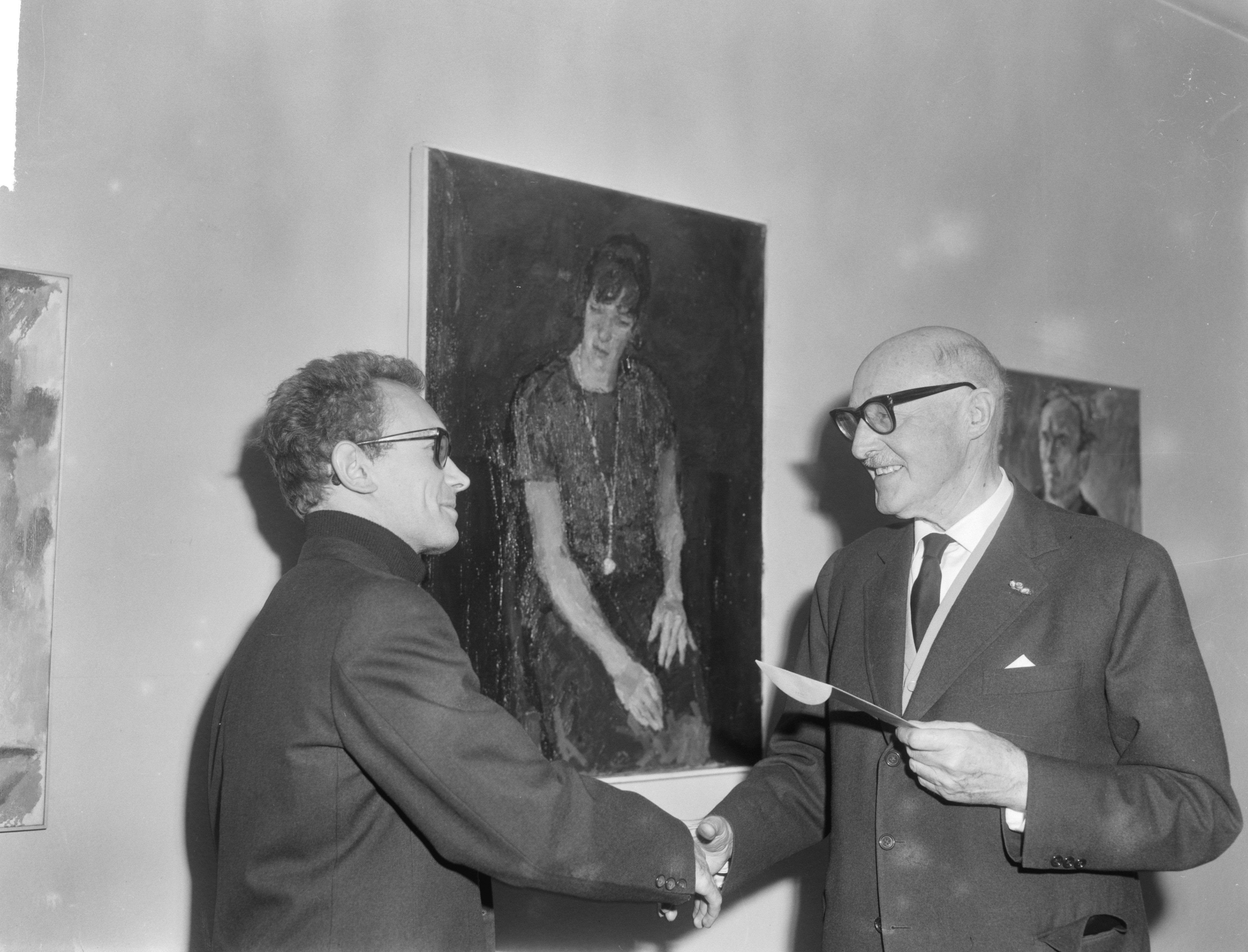 Collectie / Archief : Fotocollectie Anefo Reportage / Serie : [ onbekend ] Beschrijving : Portretprijs 1964 van de Therese van Duyl Schwartze stichting door kunstschilder Bart Peizel (rechts) uitgereikt aan Henk Pander (links) Datum : 30 oktober 1964 Trefwoorden : kunstschilders, stichtingen Fotograaf : Bilsen, Joop van / Anefo Auteursrechthebbende : Nationaal Archief Materiaalsoort : Negatief (zwart/wit) Nummer archiefinventaris : bekijk toegang 2.24.01.04 Bestanddeelnummer : 917-0796